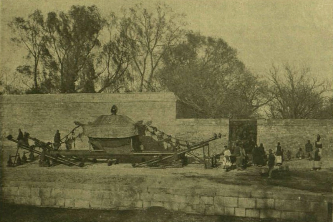 "Temetéseknél használt palankin" - gróf Zichy Jenő ázsiai expedícióján készült fotó